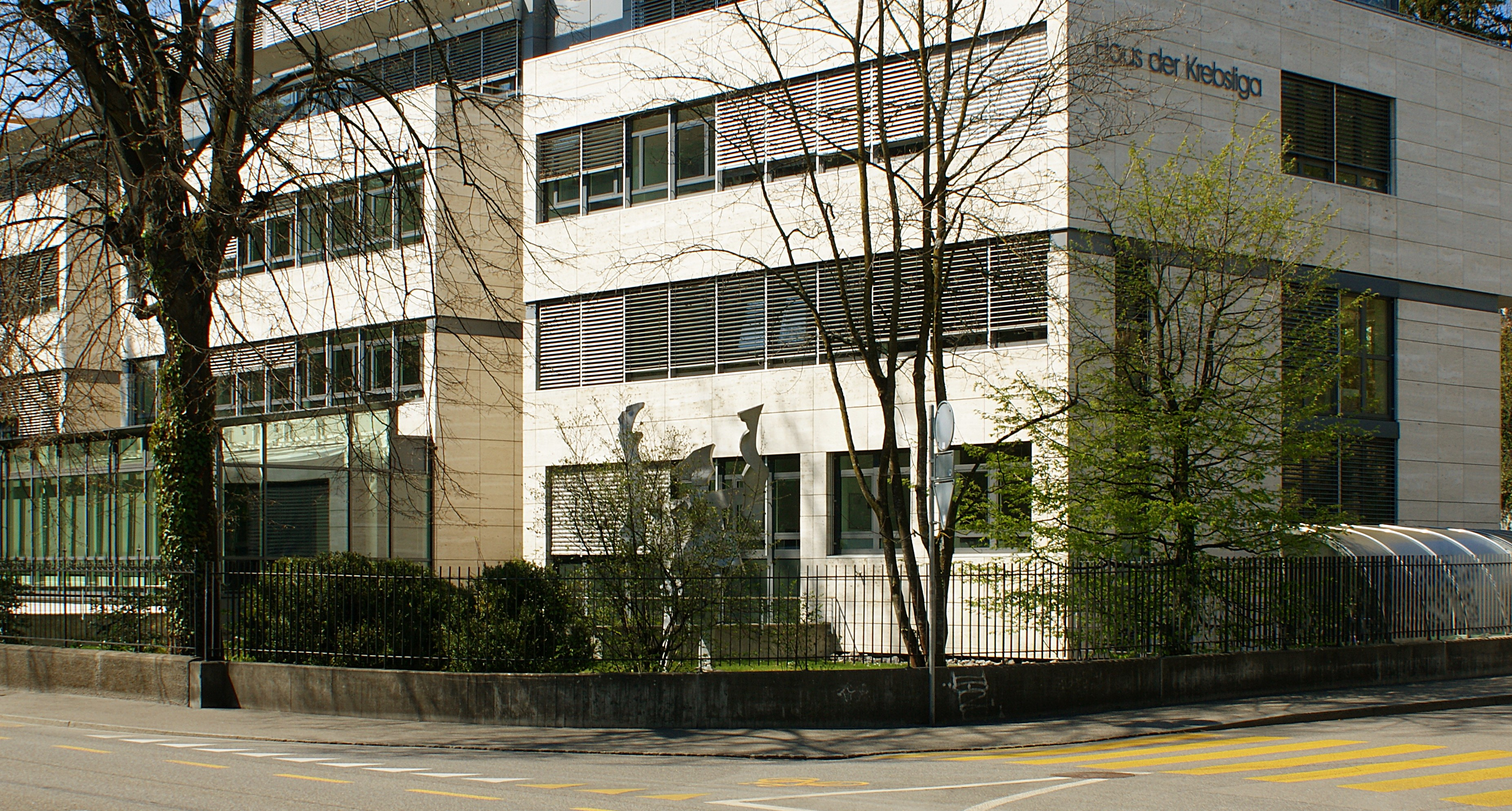 Situation Aluminiumblechplastik Diskutierender (Kurt Laurenz Metzler 1996) vor dem Gebäude Haus der Krebsliga Effingerstrasse 40